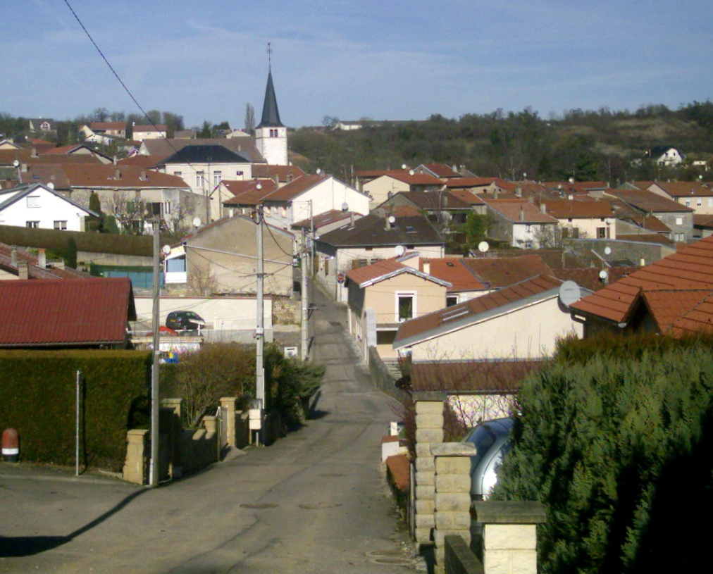 Norroy-lès-Pont-à-Mousson